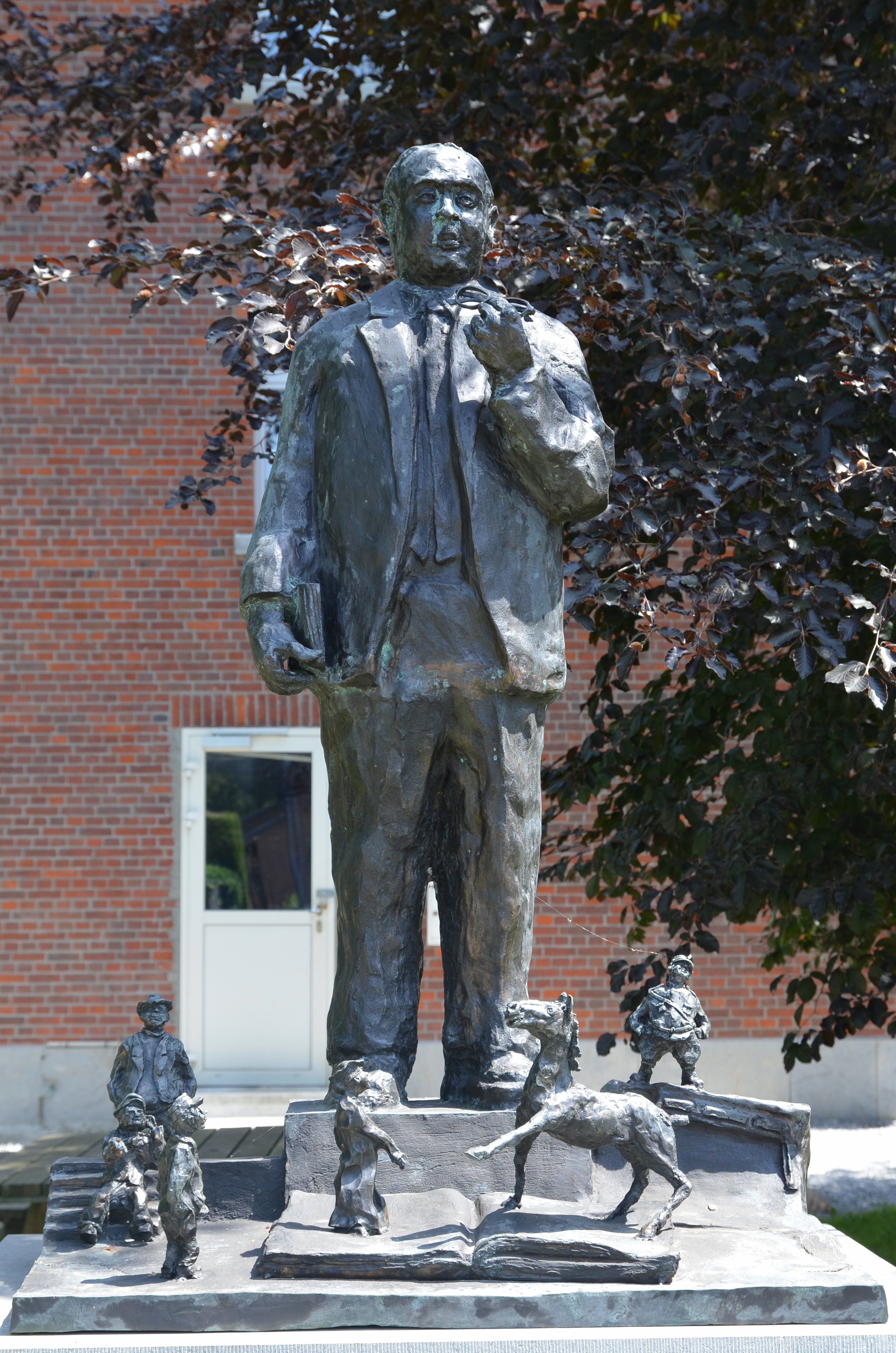 Rièzes (Chimay-Belgique) - monument à Arthur Masson, né dans ce village en 1896. Œuvre de Robert Bronchart, 2003.